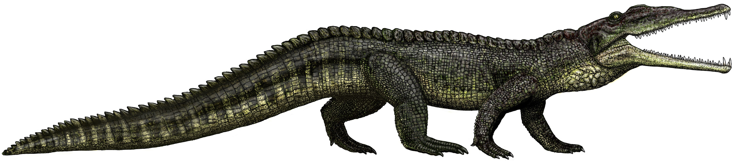 Credit Dr. Jeff Martz/NPS